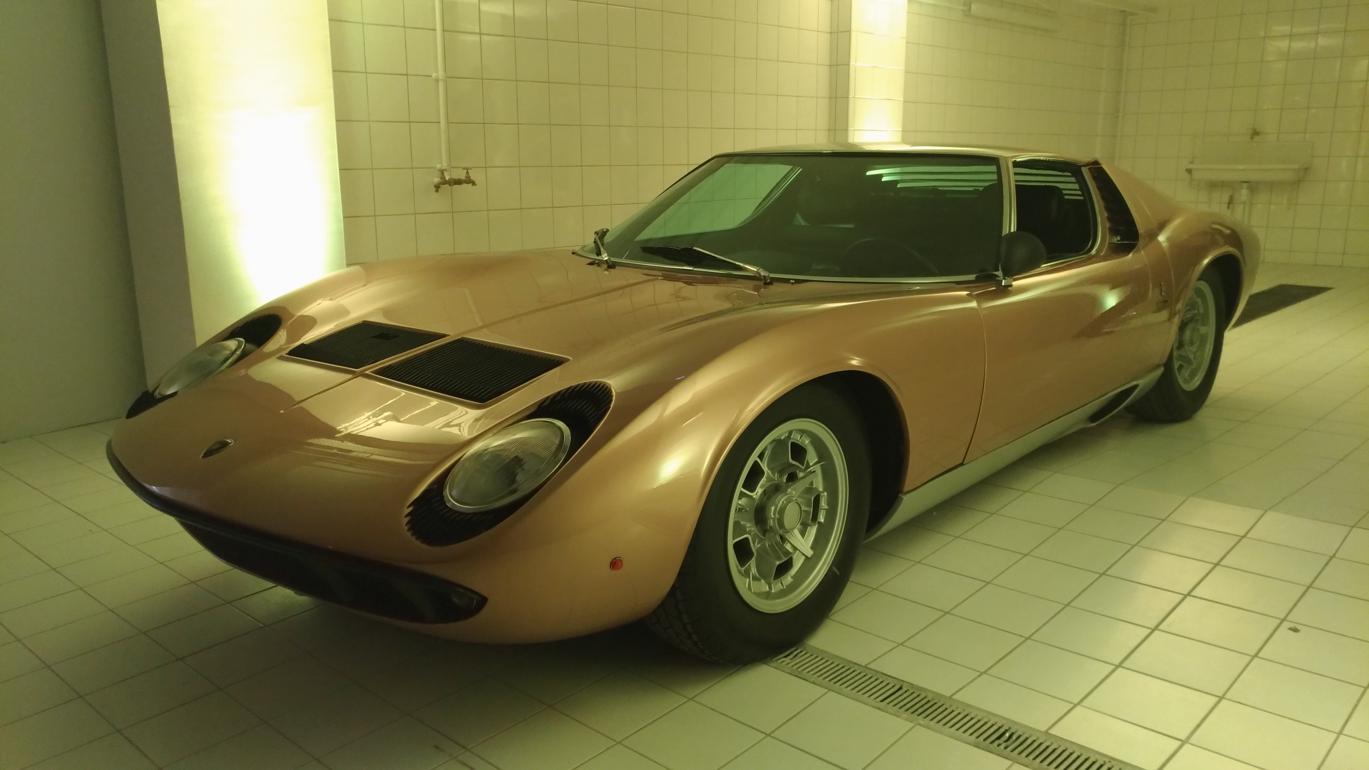 Lamborghini Miura - Soirée inaugurale concession Lamborghini Groupe Schumacher